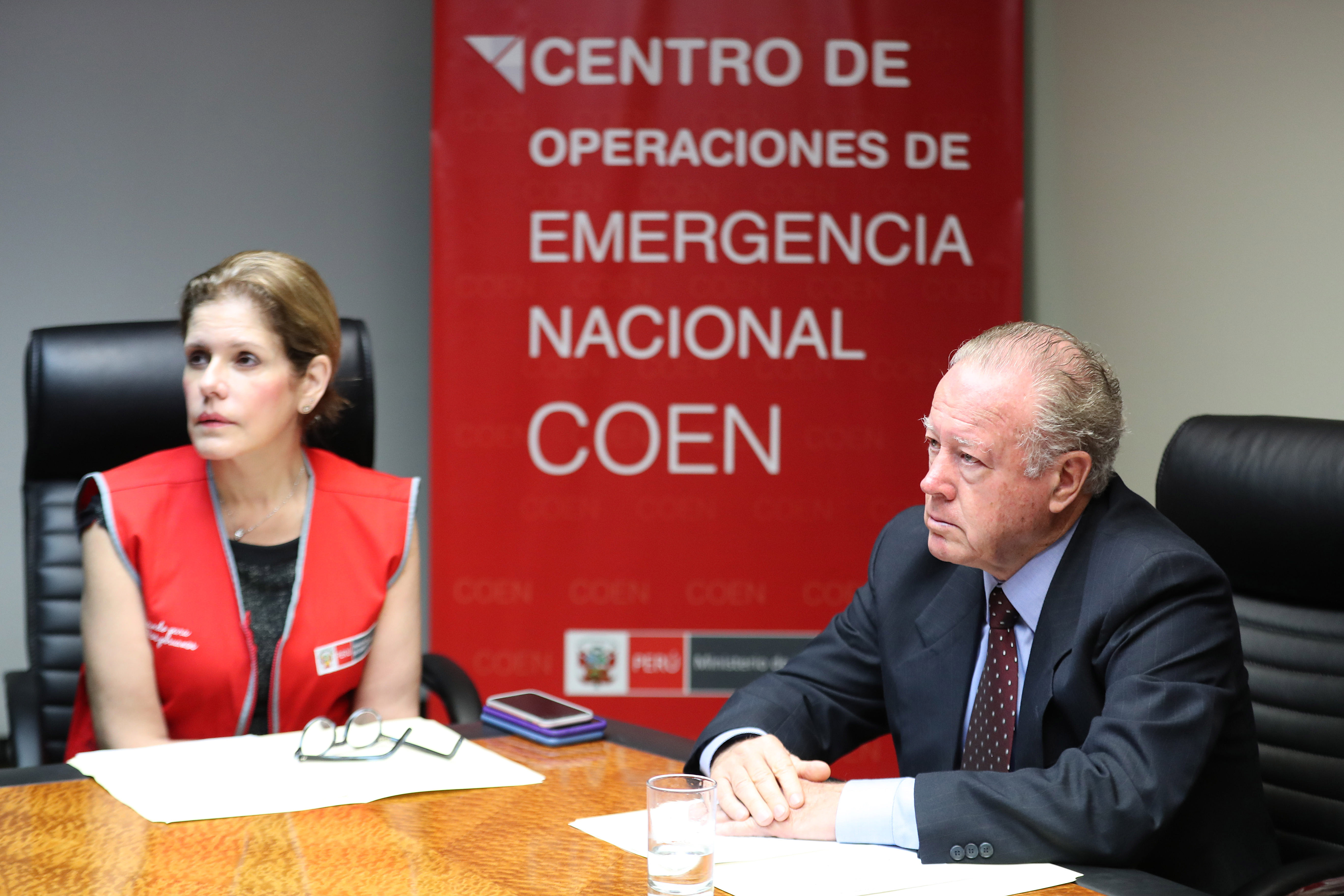 La primera ministra Mercedes Araoz y el ministro de Defensa Jorge Kisic, informando en el COEN.